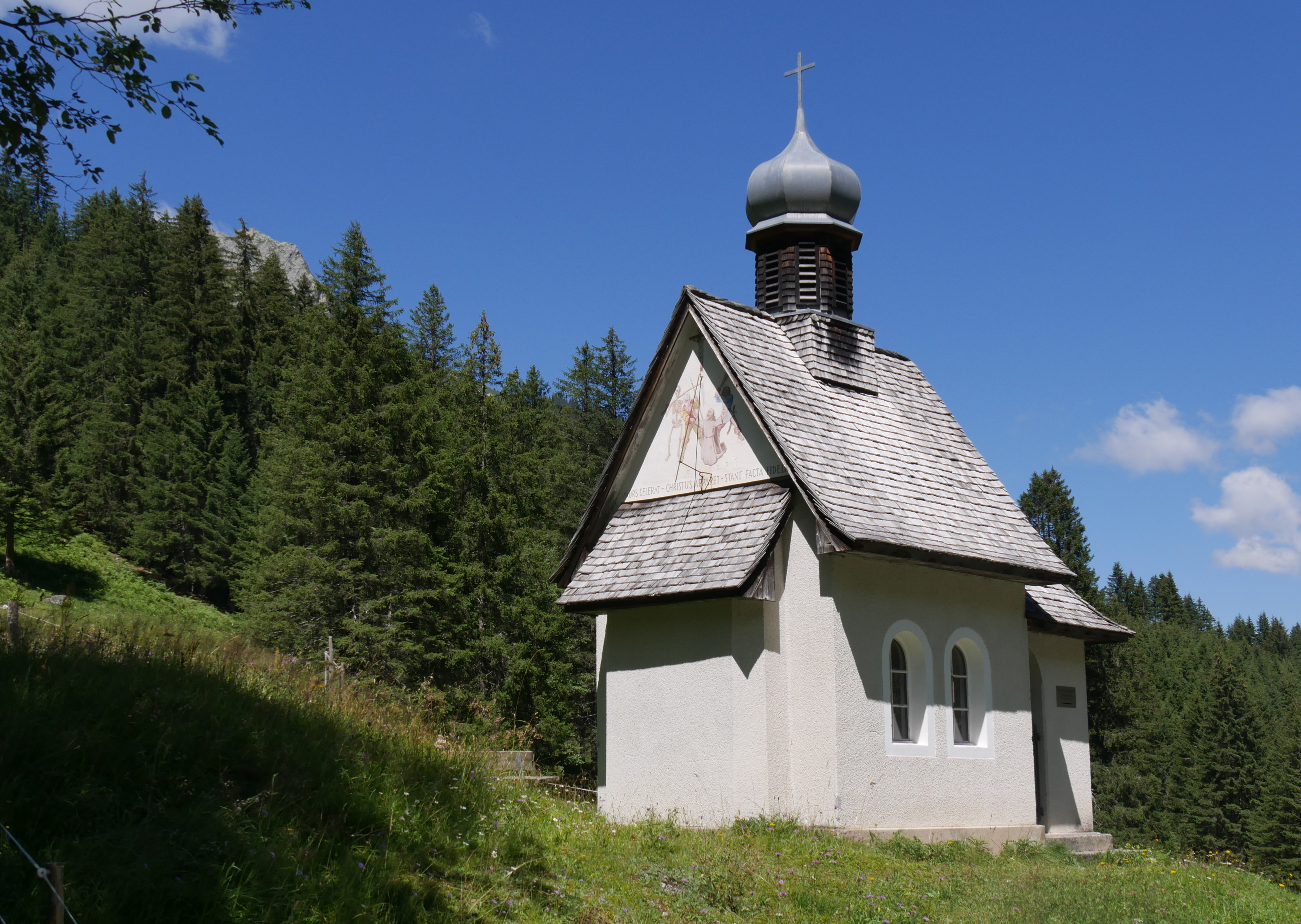 Fideliskapelle (Gargellen) an der Talstraße von St.Gallenkirch nach Gargellen